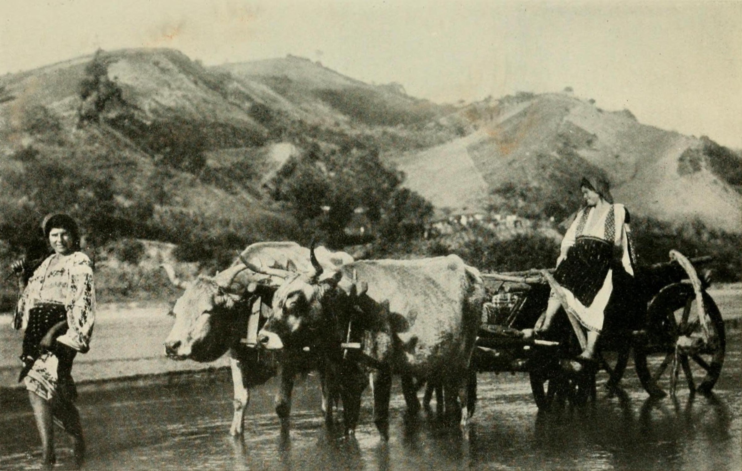 Dealuri subcarpatice